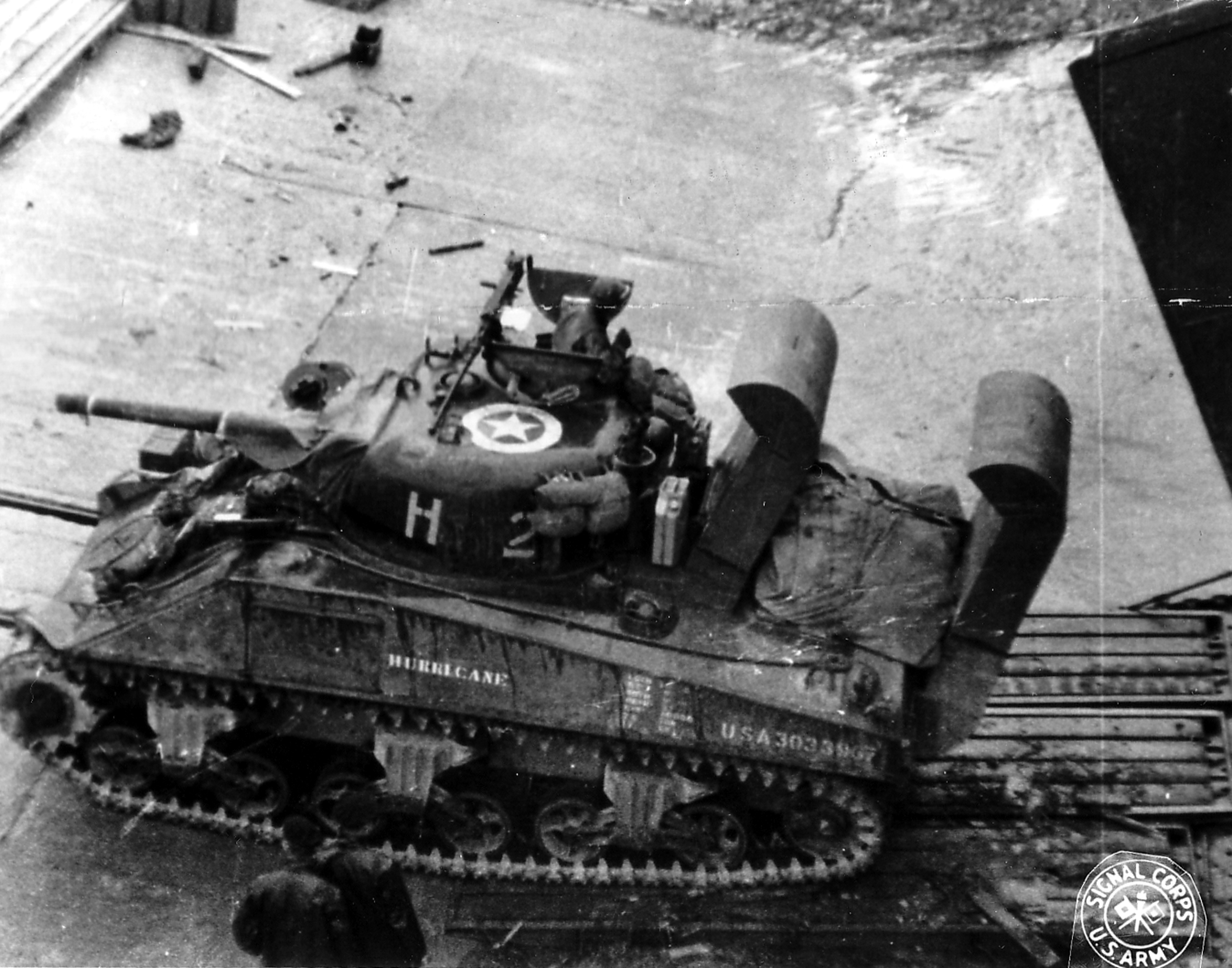 Bataille de Normandie : été 1944 : Du haut d'un LST: débarquement d'un char Sherman.